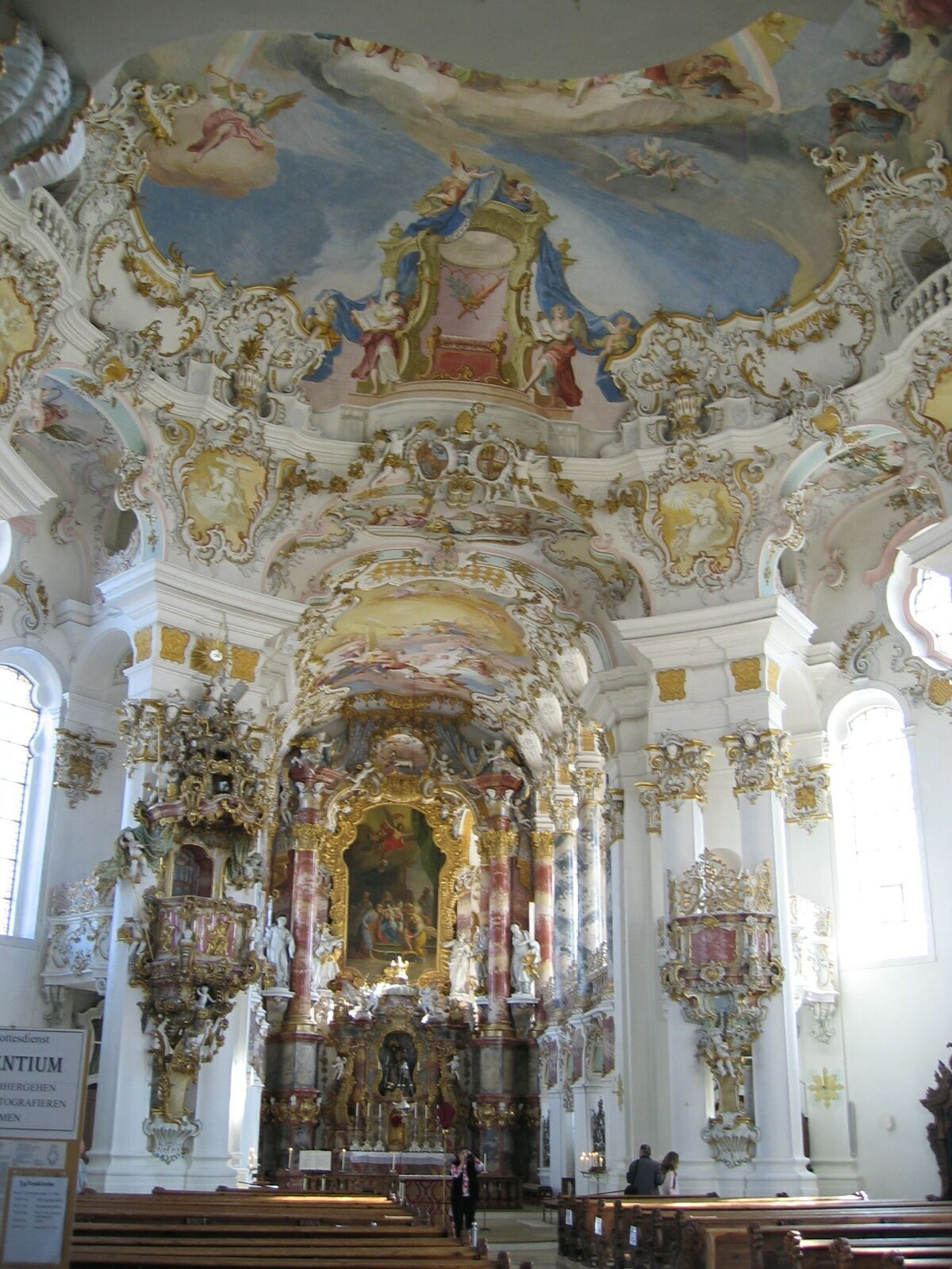 Altarraum der Wieskirche